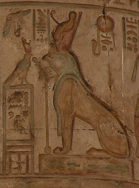 Détail d'un pilier du temple de Kôm Ombo